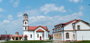 Busije